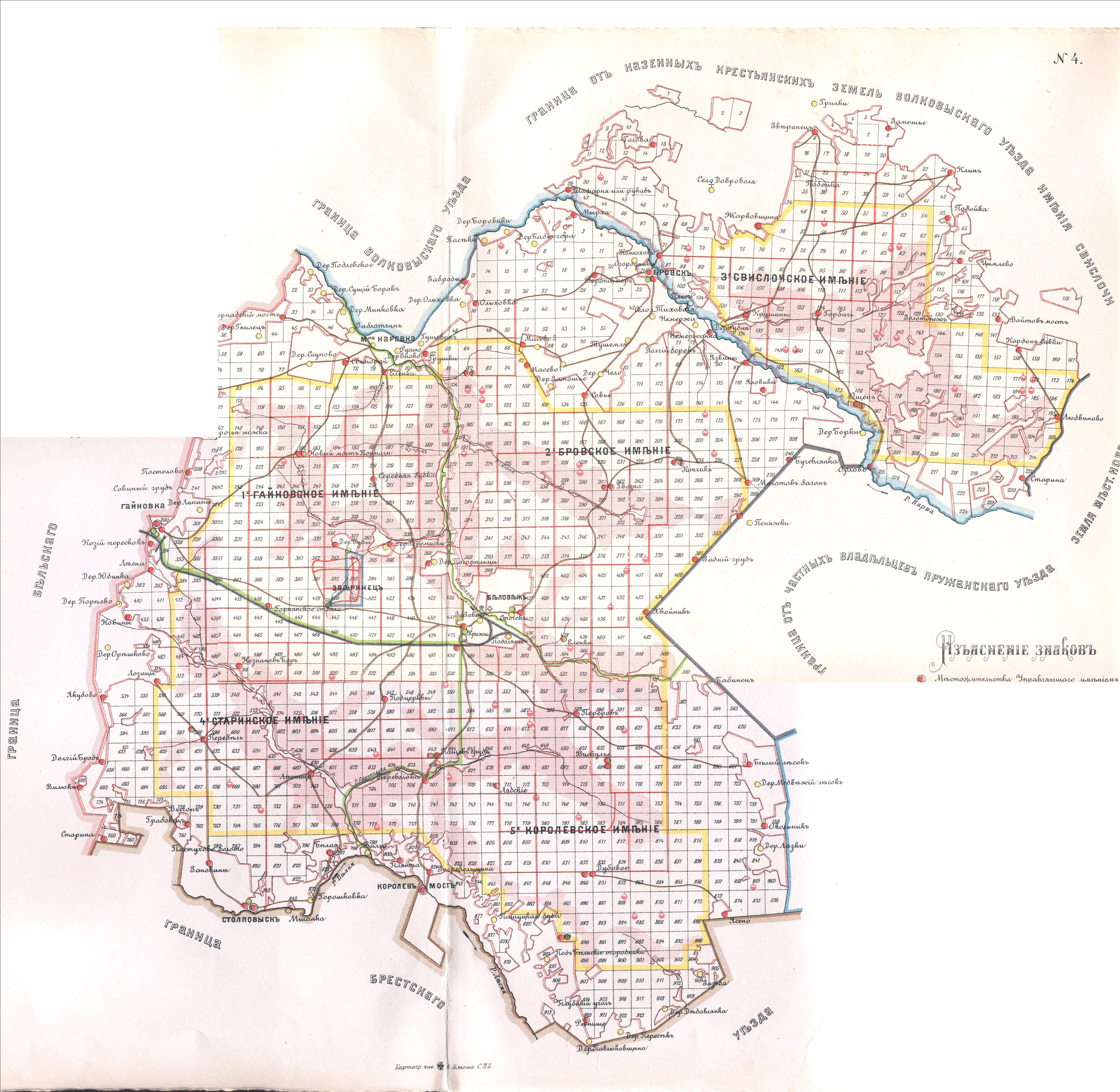 Беларуская (тарашкевіца): Мапа Белавескай пушчы 1900 р.